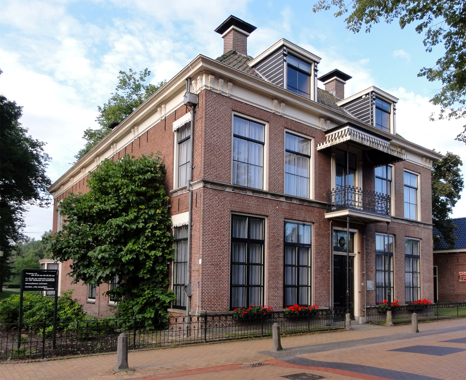 Lycklamahuis (gemeentehuis), Hoofdstraat 80 Beetsterzwaag